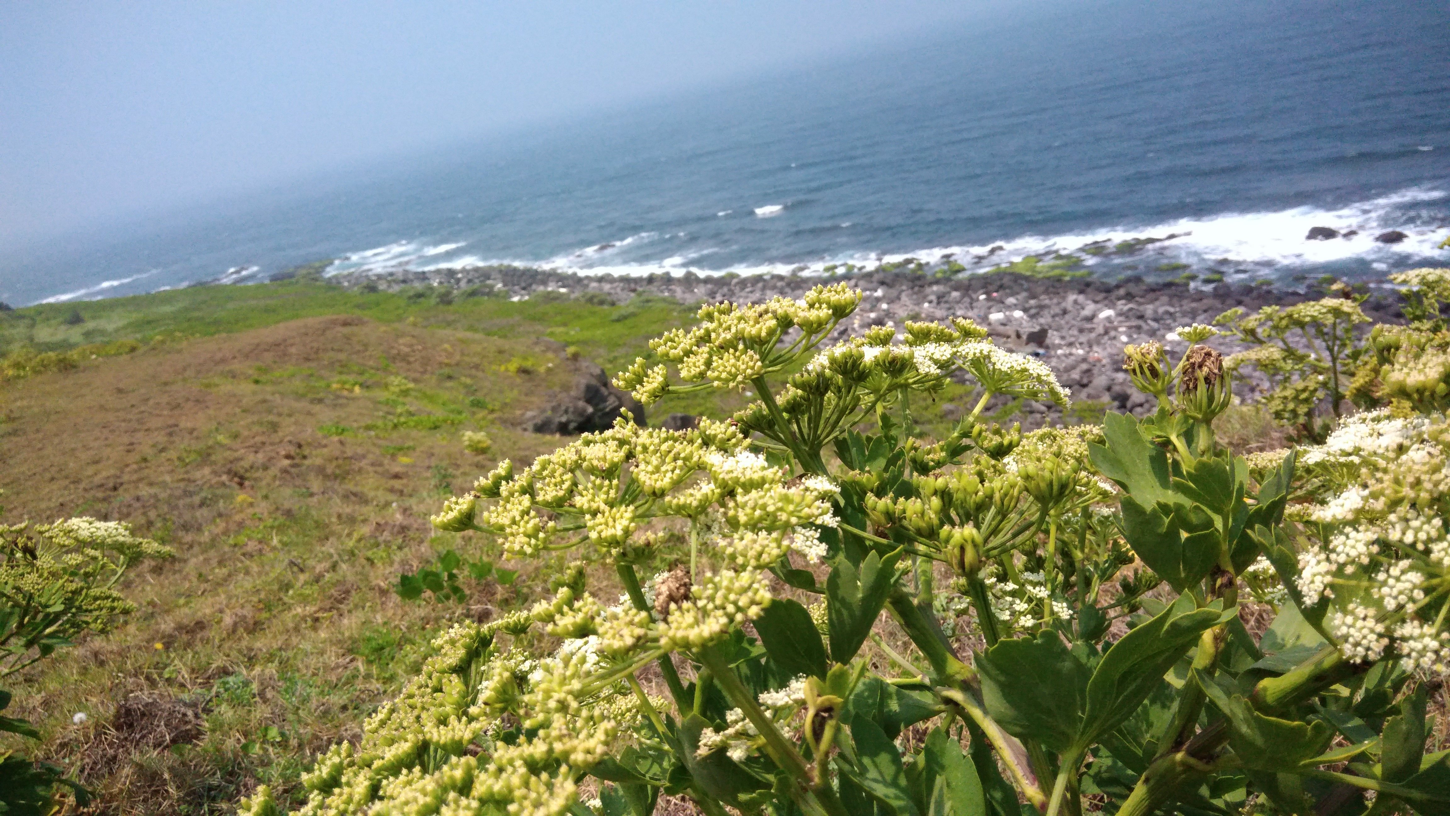 中文（台灣）: 日本前胡，攝於彭佳嶼